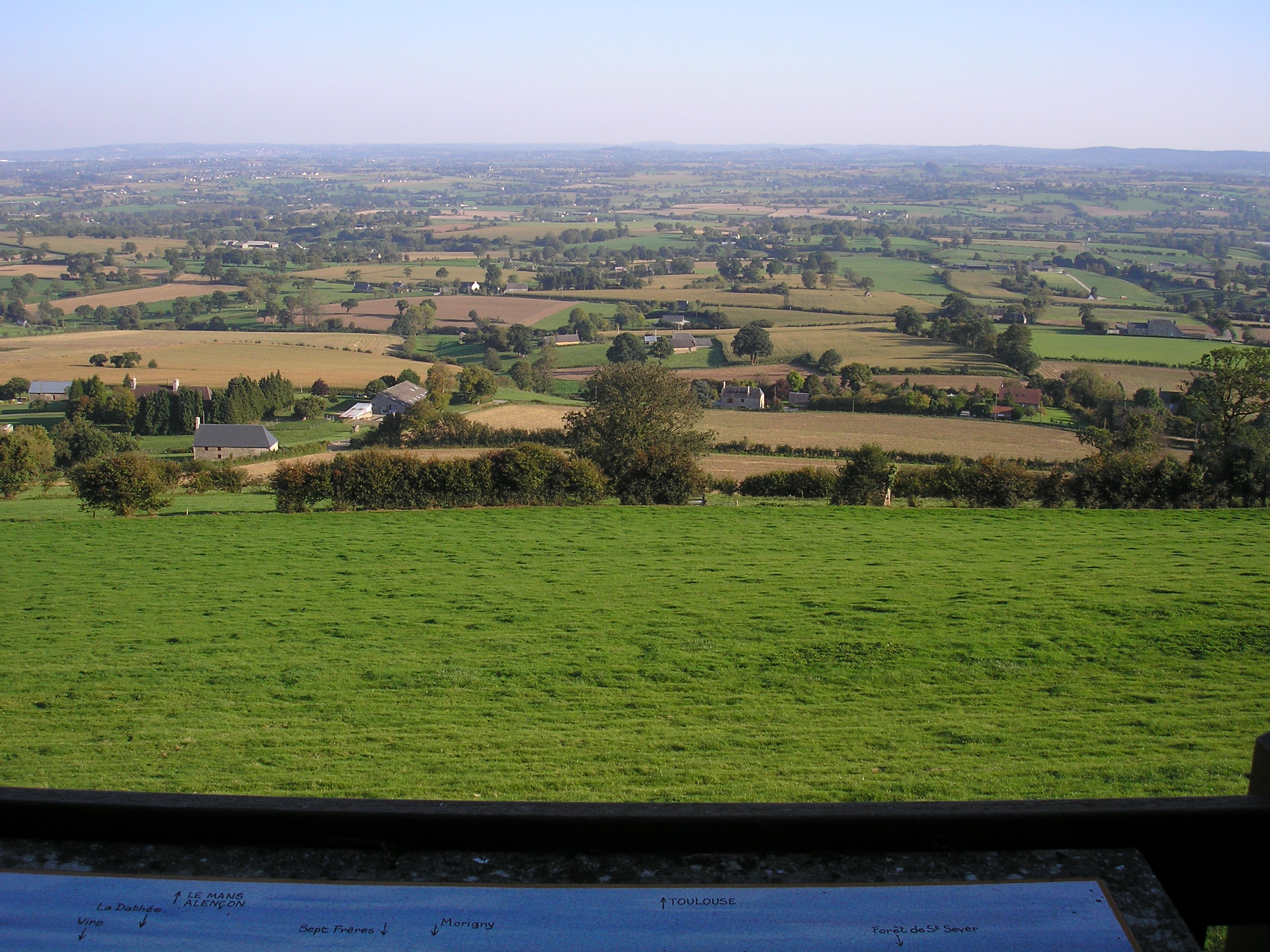 Saint-Vigor-des-Monts (Normandie, France). Vue sur l'ouest du Bocage virois.